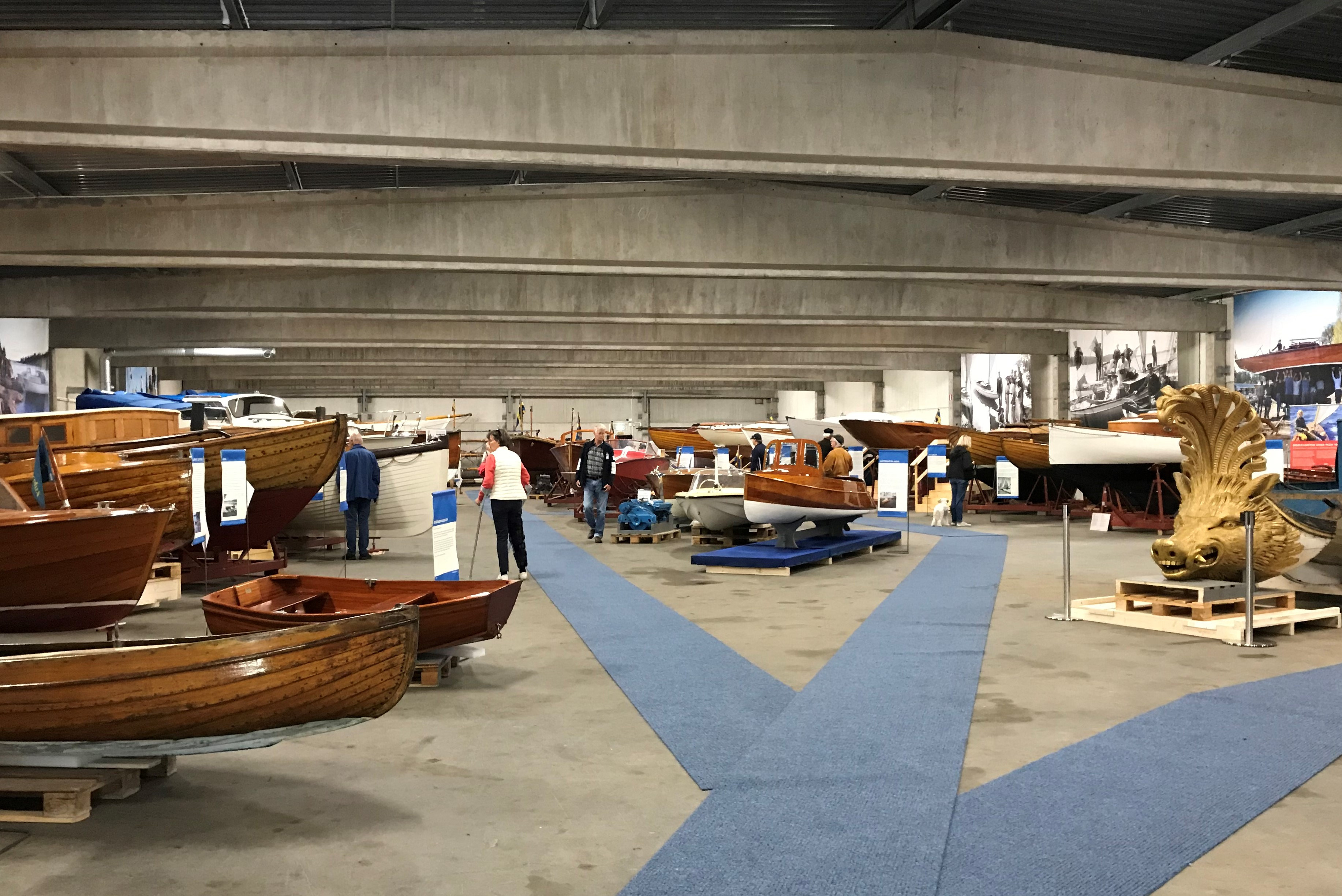 Sjöhistoriska museets båtmagasin på Rindö, interiör, den 14 augusti 2019